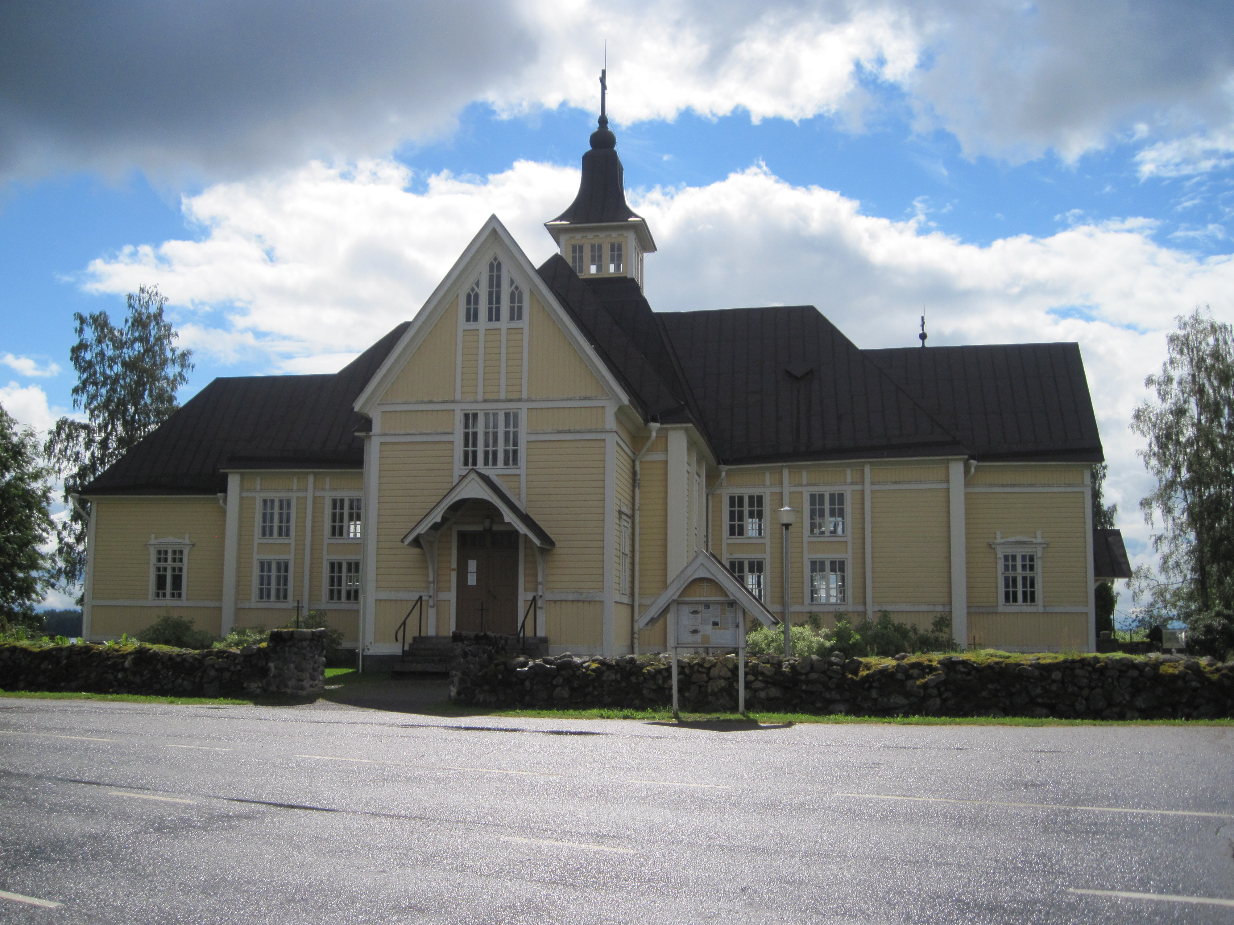 Tohmajärven kirkko kesällä 2012